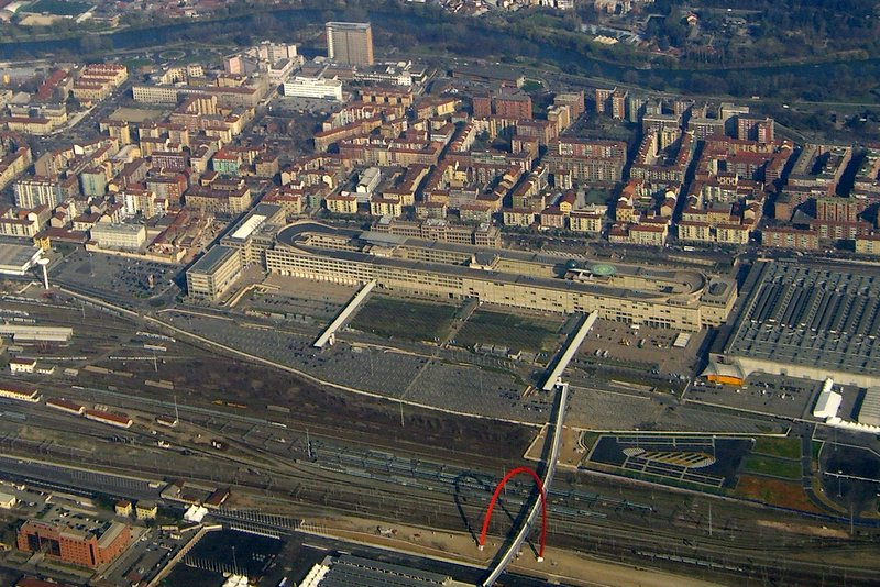 Le Lingotto vu du ciel (Turin), Vincent Debierre